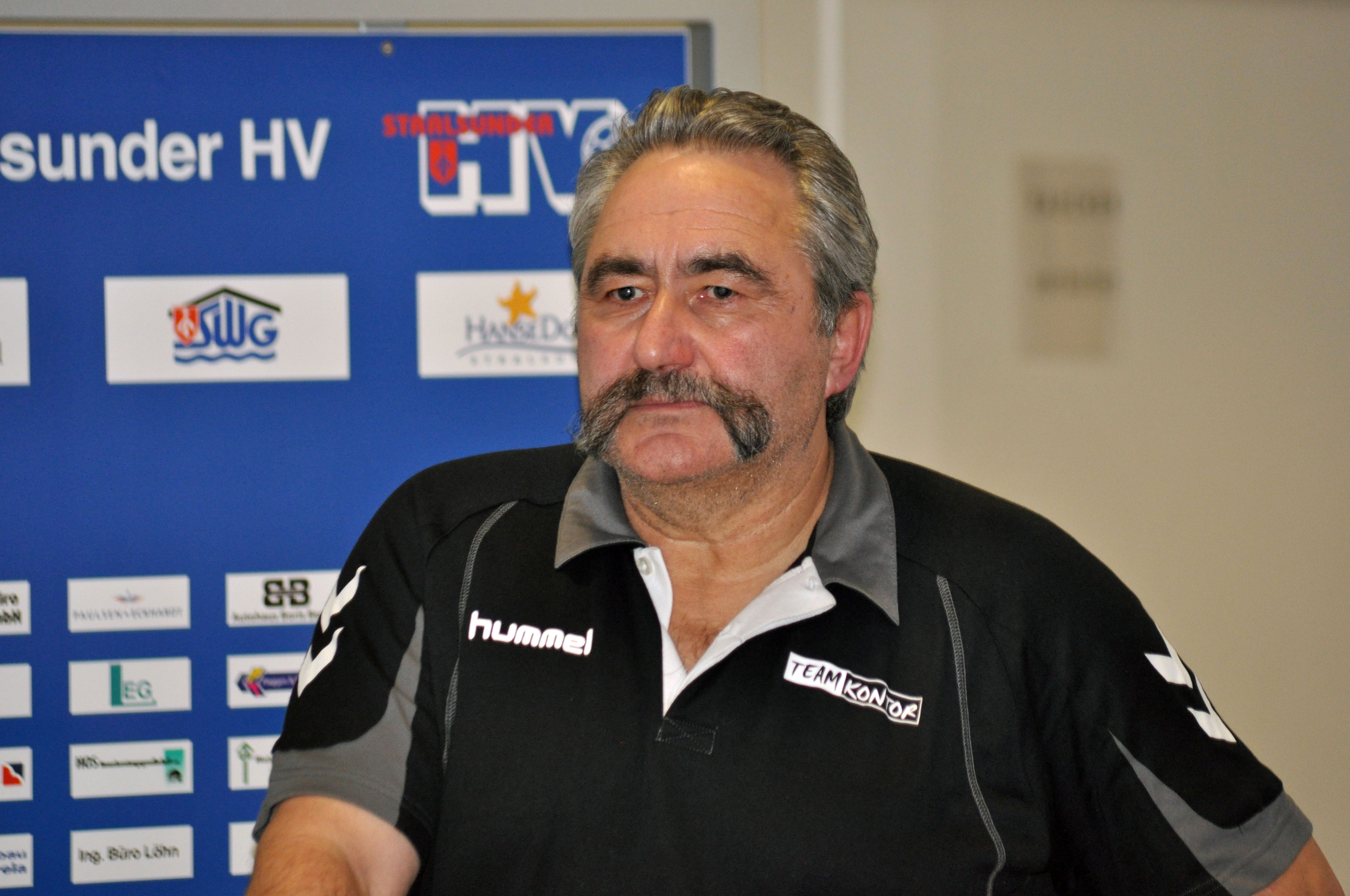 Peter Höhne am 12.11.2011 auf der Pressekonferenz nach dem 3.-Liga-Spiel des Stralsunder HV gegen den SV 63 Brandenburg-West (31:28).